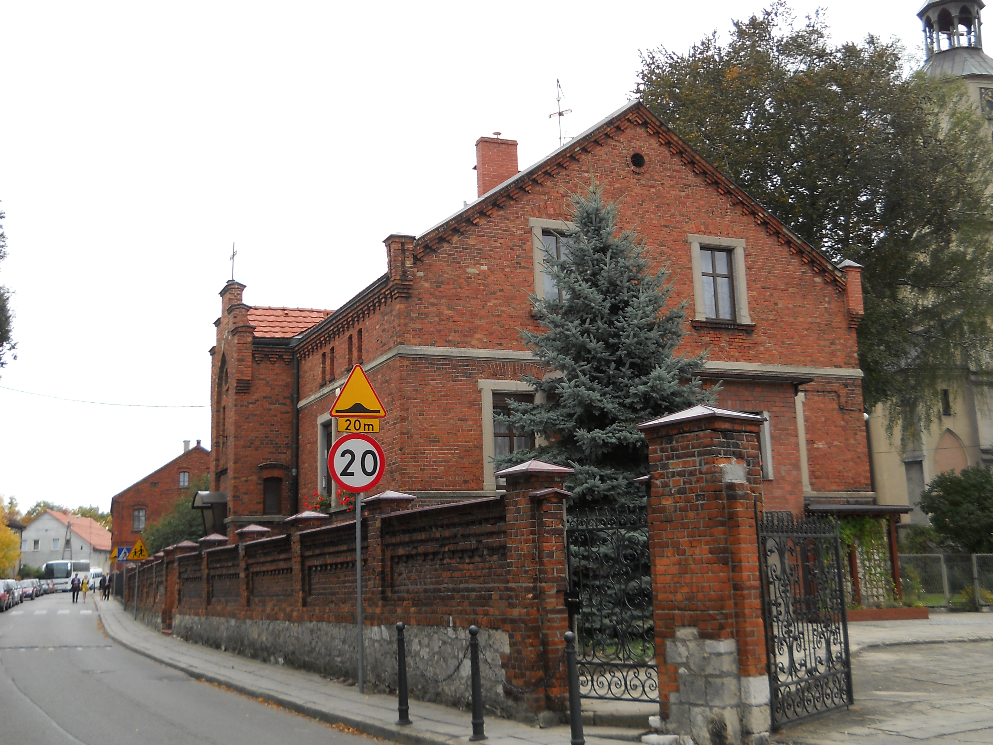 Pyskowice, ul. Poniatowskiego 10 - kościół parafialny pw. św. Mikołaja, plebania (zabytek nr A/289/60 z 7.03.1960)